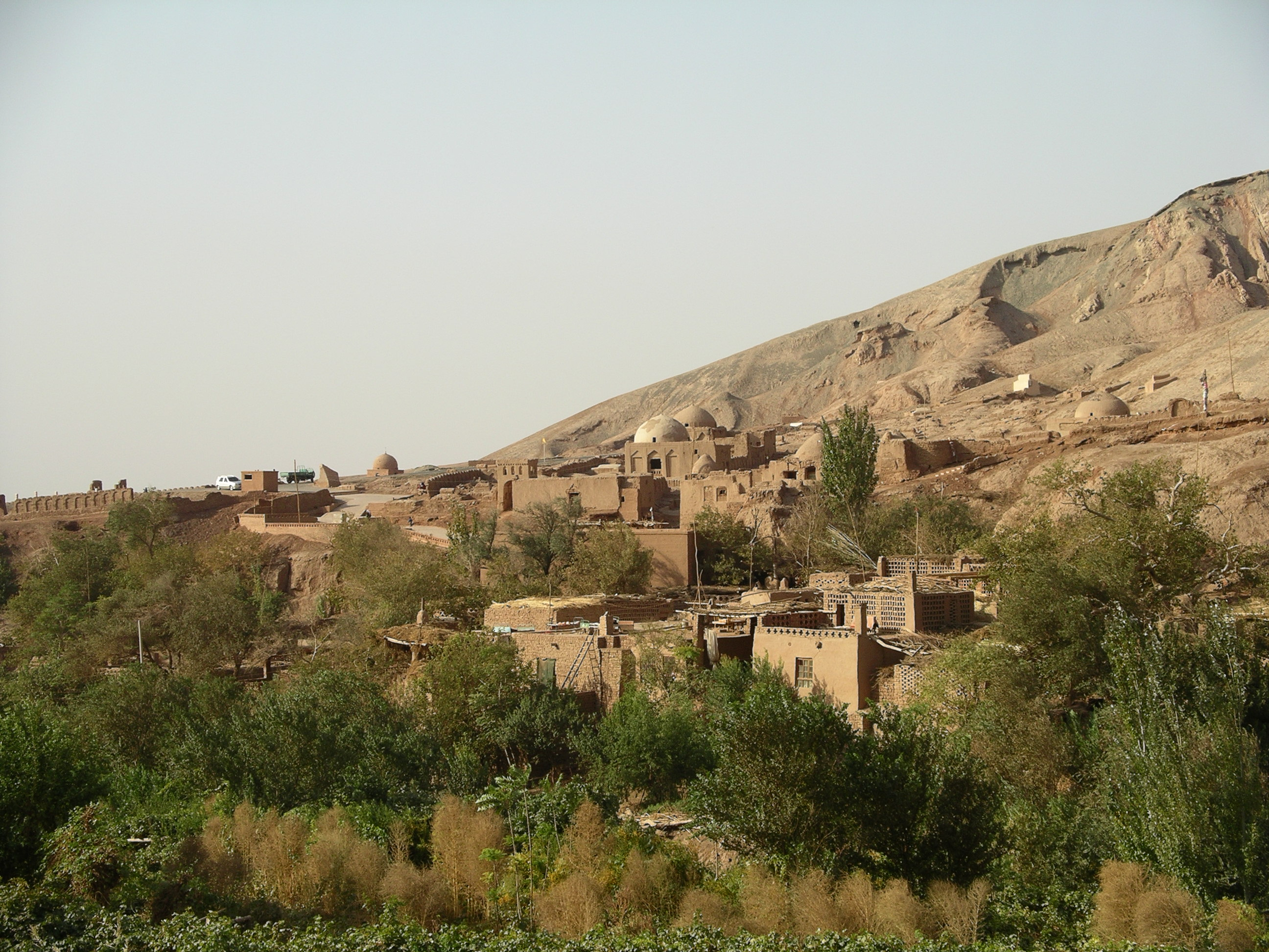 Tuyoq (near Turpan), Xinjiang, China